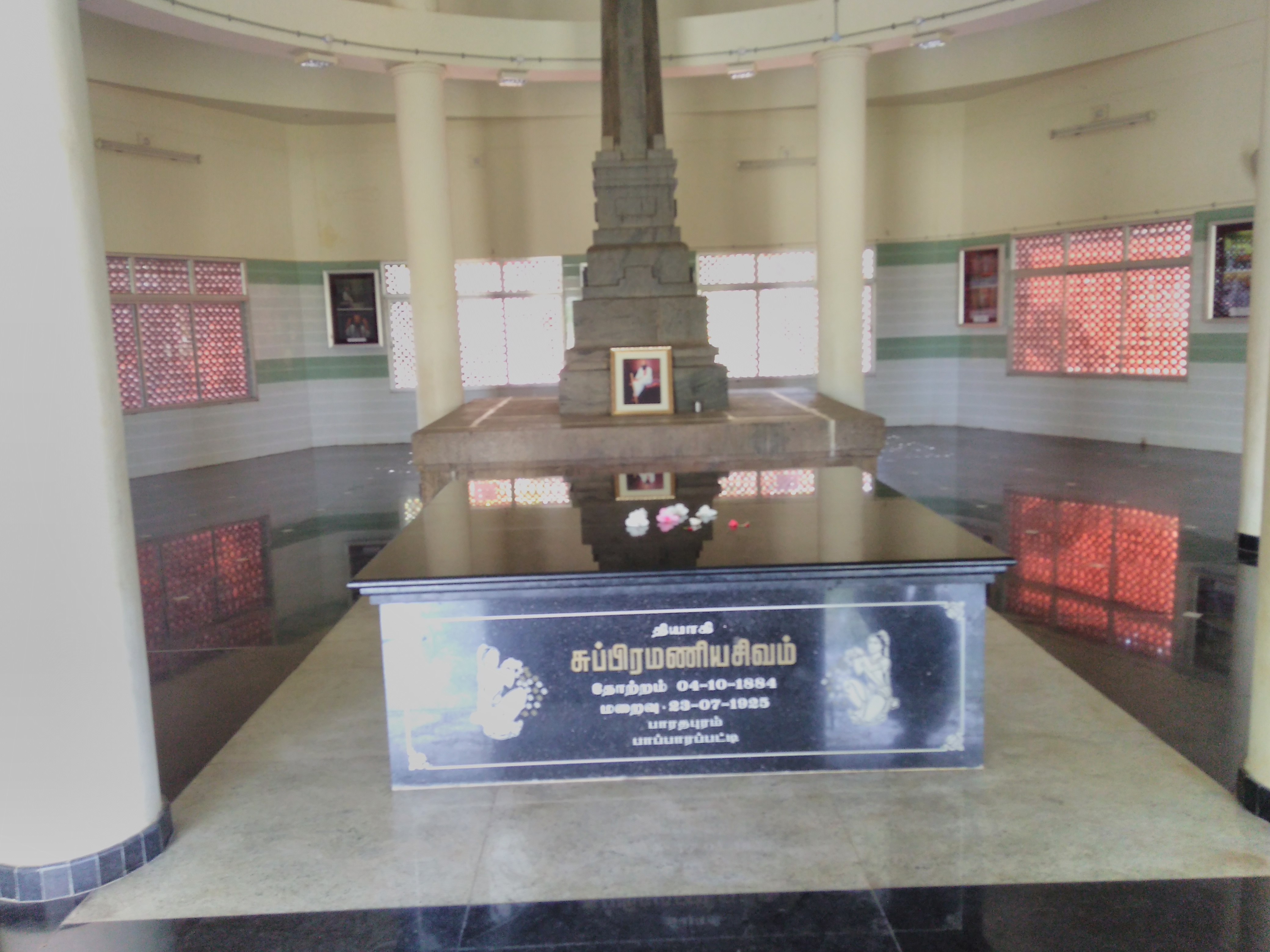 மணிமண்டபம்